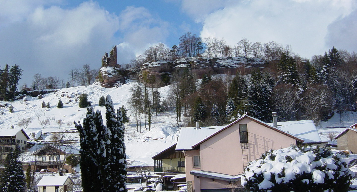 Le château de Pierre-Percée (Lorraine)